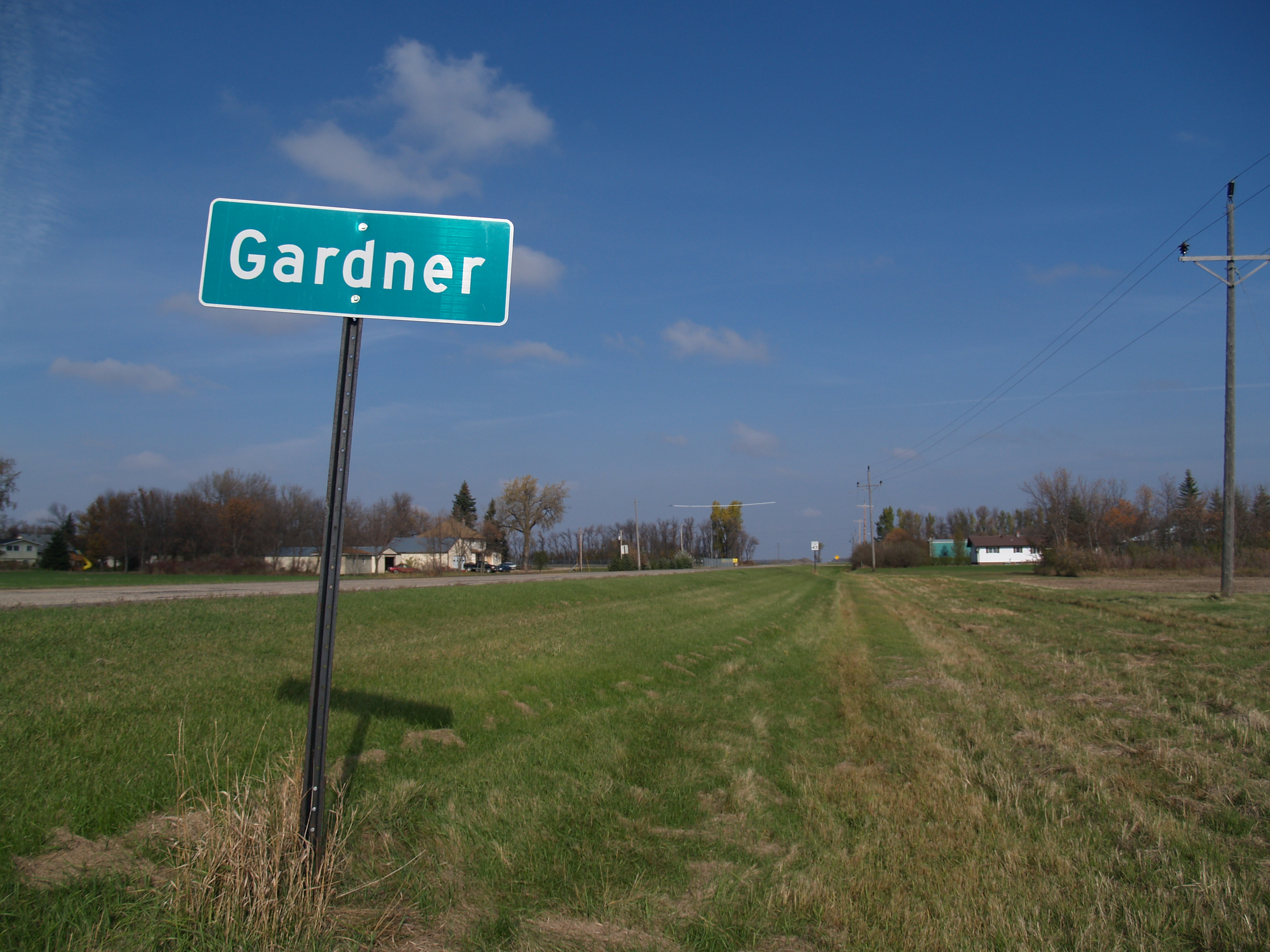 Sign in Gardner, North Dakota